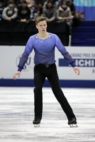 Алексей Ерохов (Россия) на финале юниорского Гран-при 2017-2018